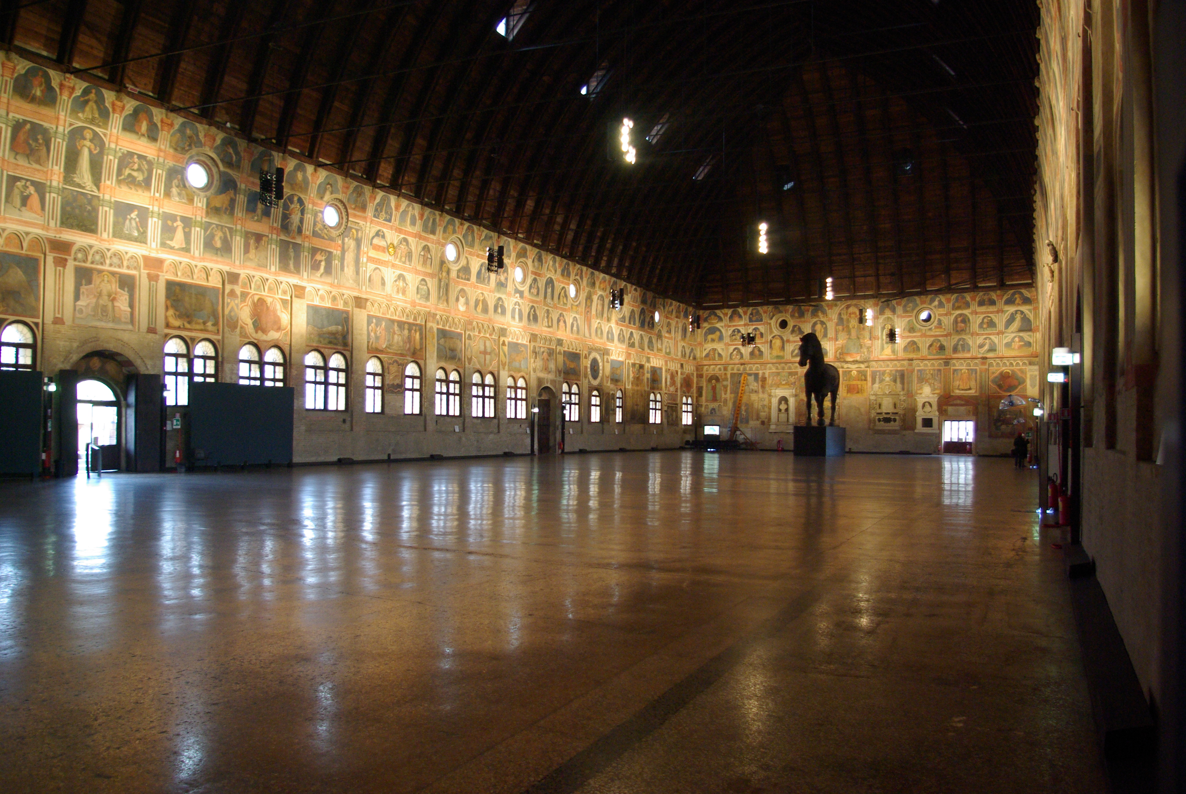 Padova, Palazzo della Ragione